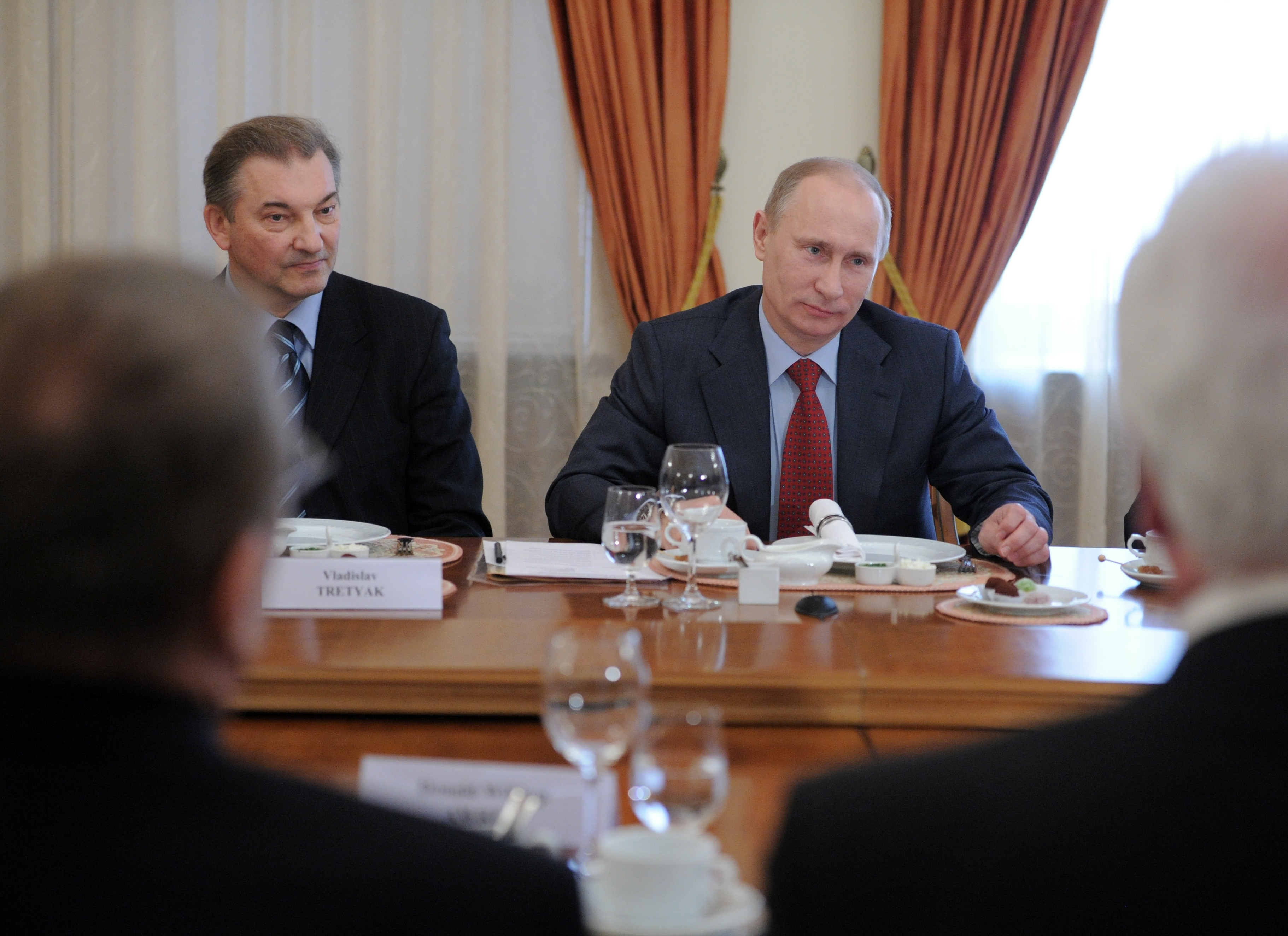 Председатель Правительства Российской Федерации В. В. Путин и вратарь сборной команды СССР В. А. Третьяк